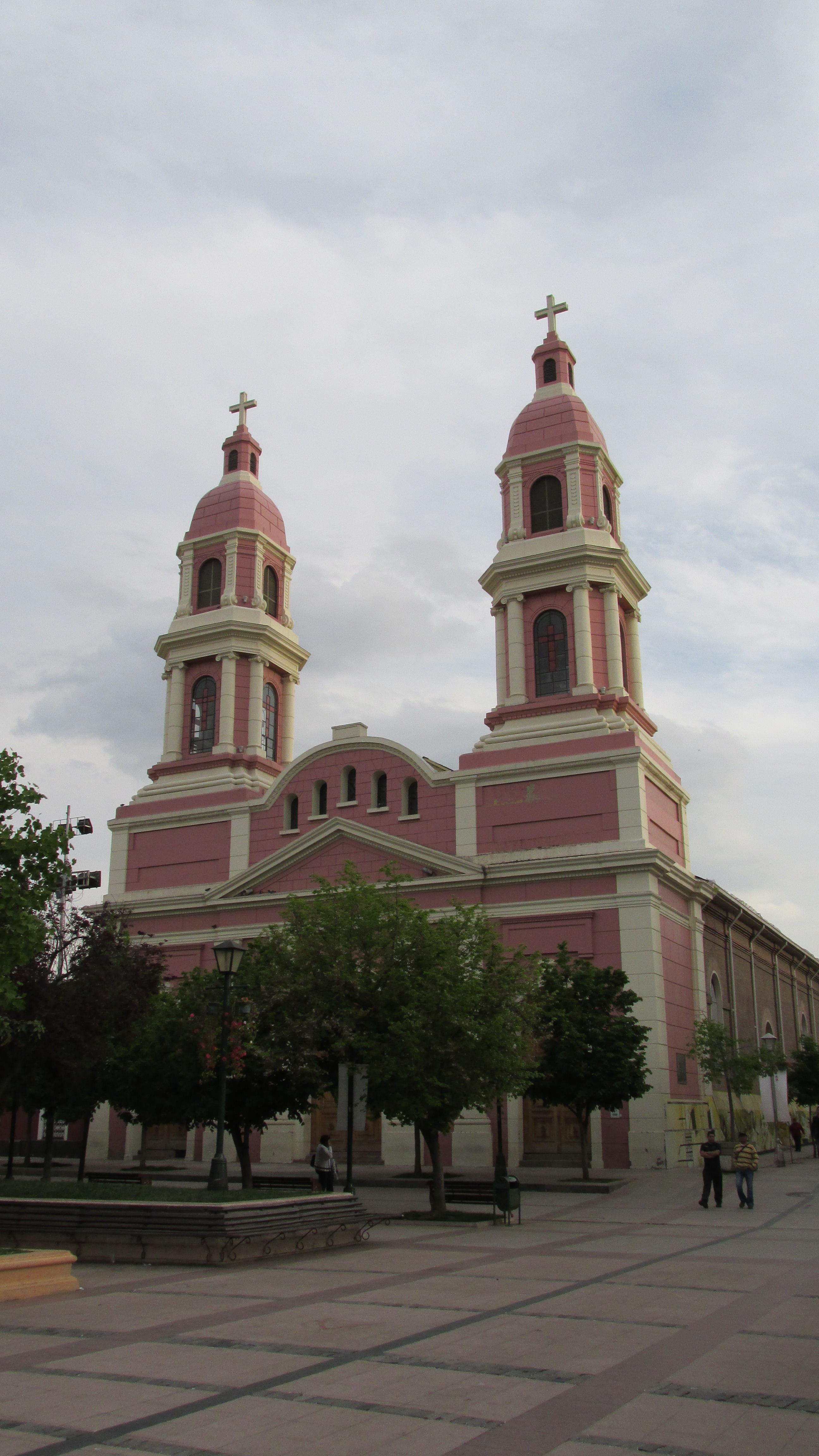 Frontis Catedral Rancagua